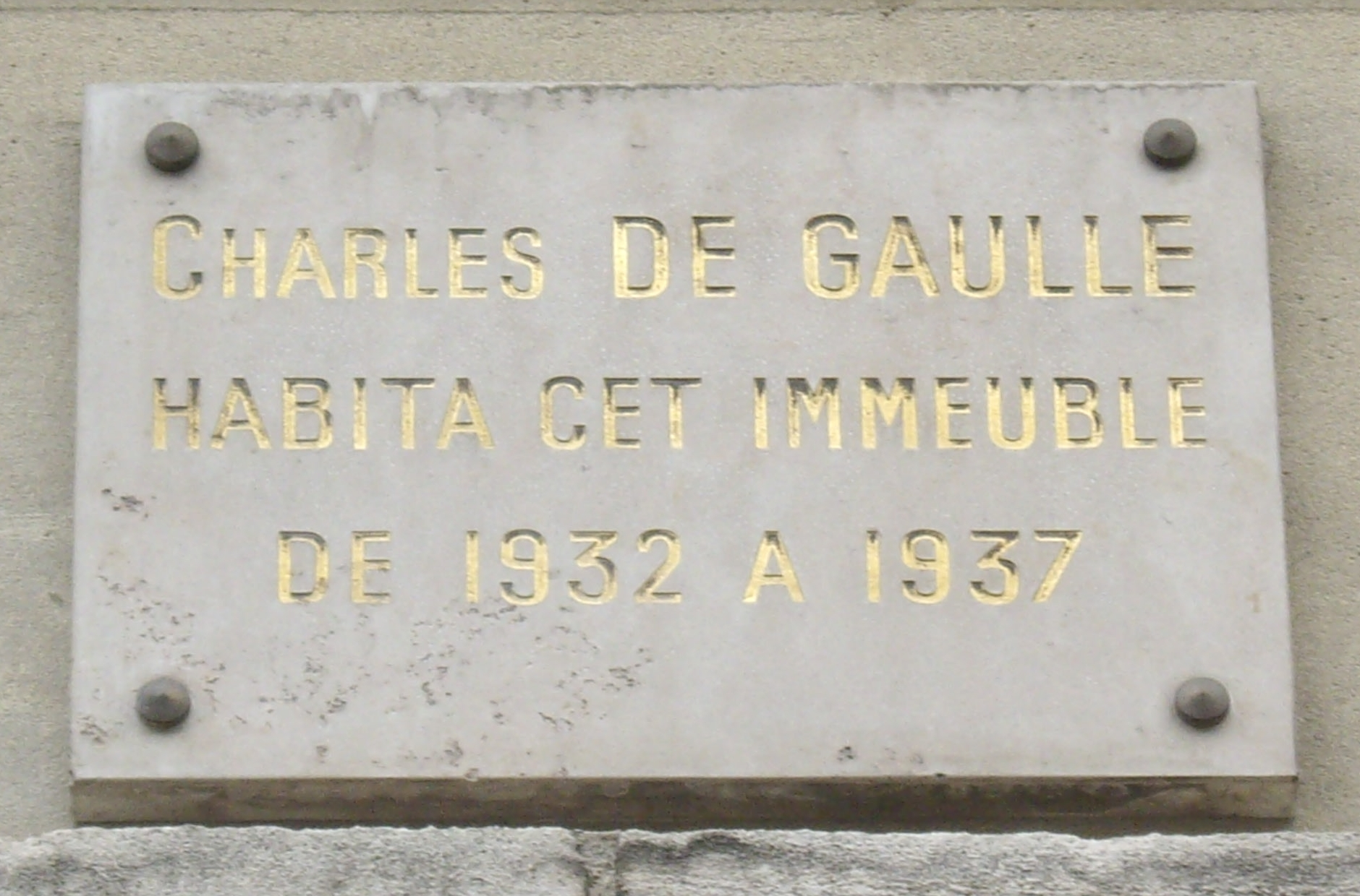 Plaque apposée au n° 110 du boulevard Raspail, Paris 6e, où habita Charles de Gaulle (1890-1970) de 1932 à 1937.